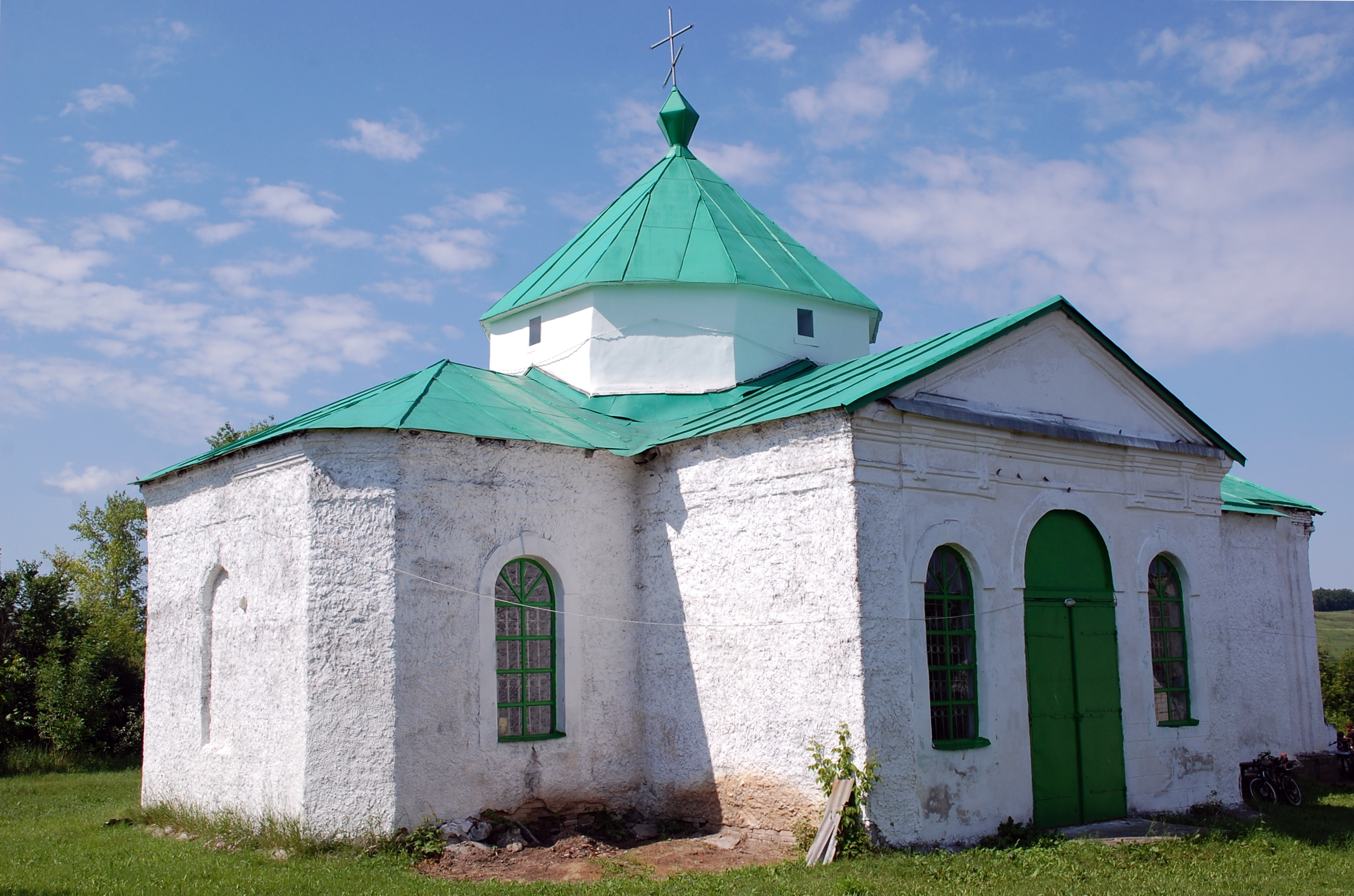 Свято Миколаївський храм Миколаївка, Луганська обл. 2013-06-09